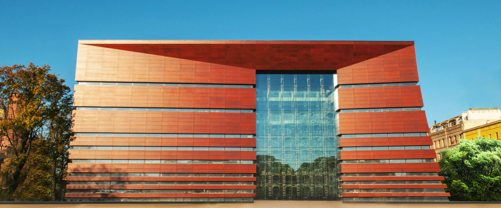 Elewacja Narodowego Forum Muzyki (październik 2014)